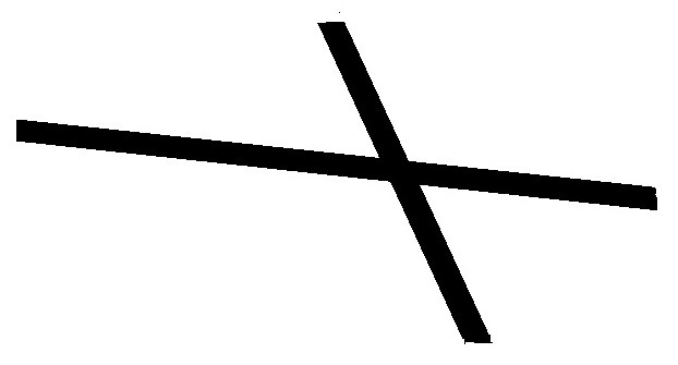 Тамга туркменского племени Эймир согласно труду Абу-л-Гази «Родословная туркмен»